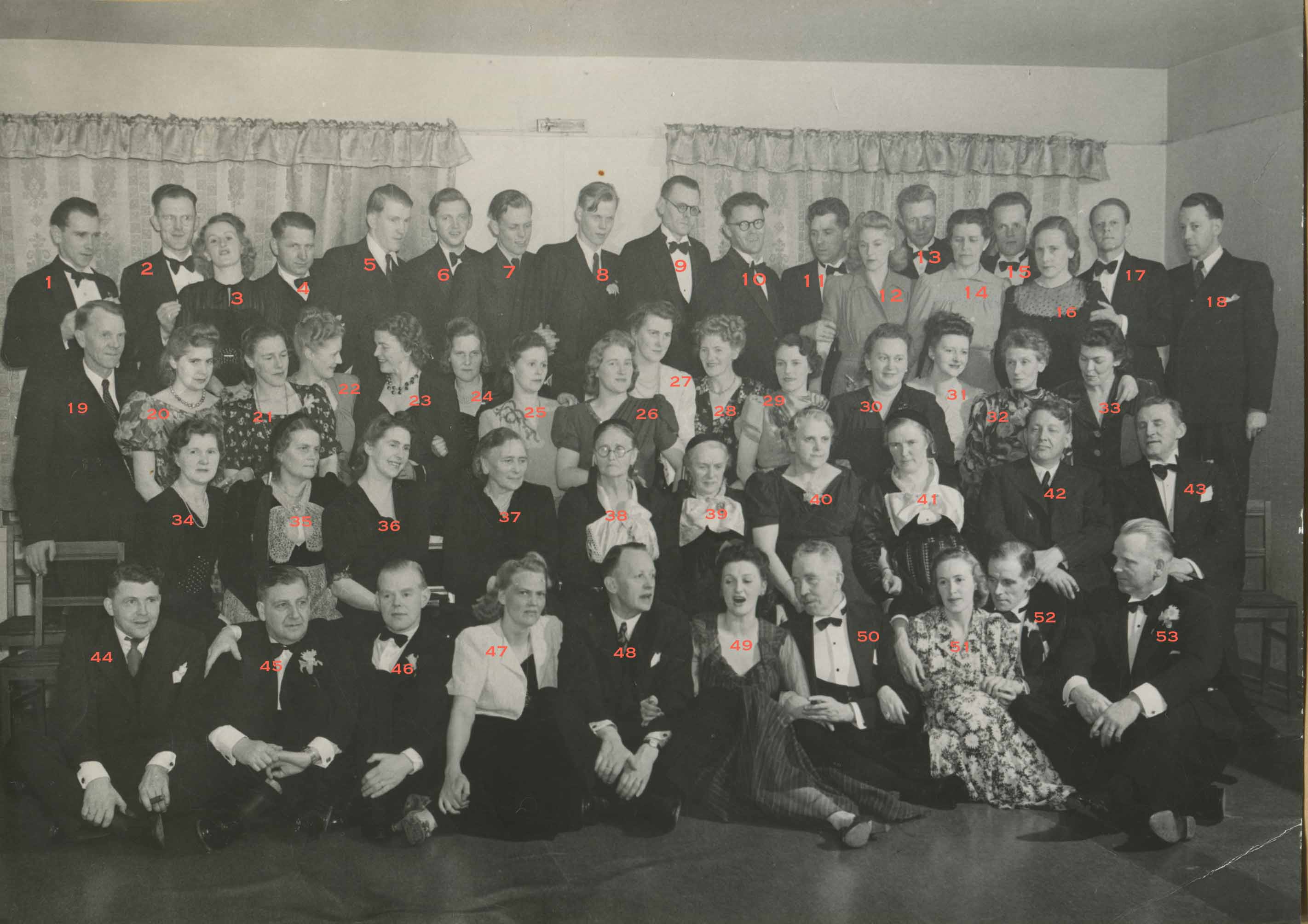 Mynd sem var tekin 1944 og sýnir fólk sem kom saman á ættarmóti sem tengdist Karlsskála við Reyðarfjörð